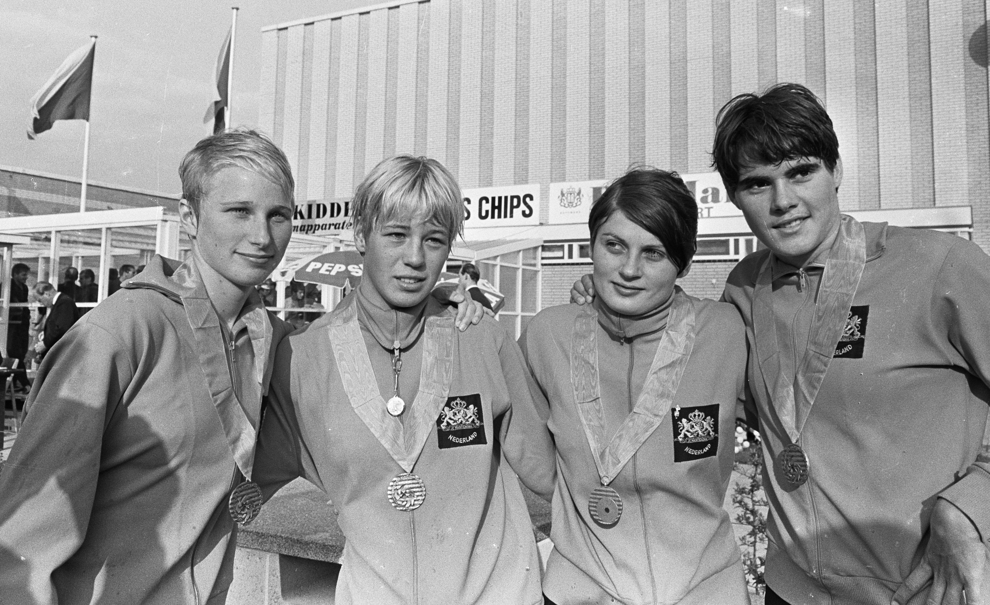 Europese Zwemkampioenschappen vrije slag Bep Weeteling, Mirjam van Hemert, Lydia Schaap en Toos Beumer behaalde brons